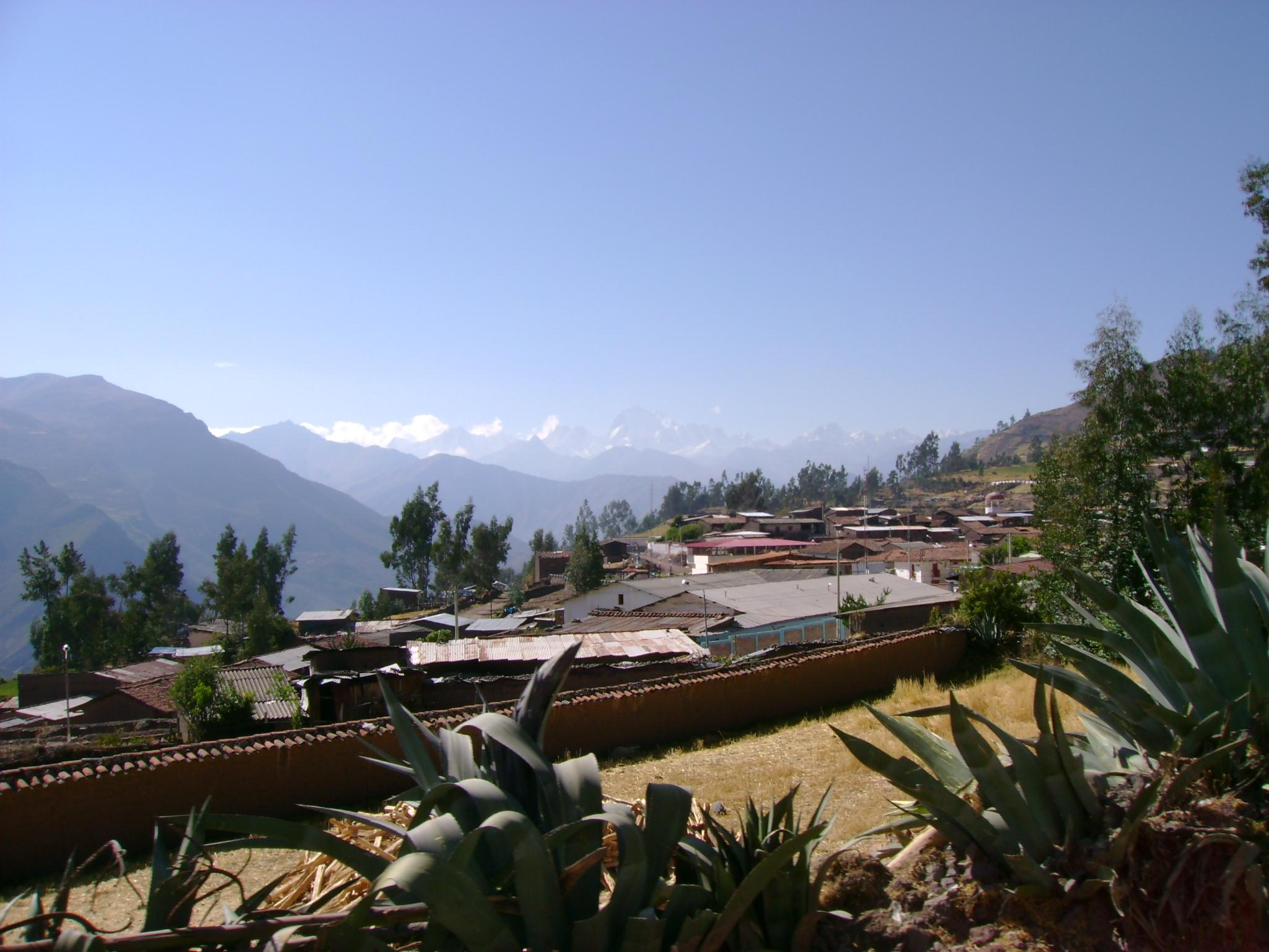 Chiquian, al fondo la cordillera Huayhuash.